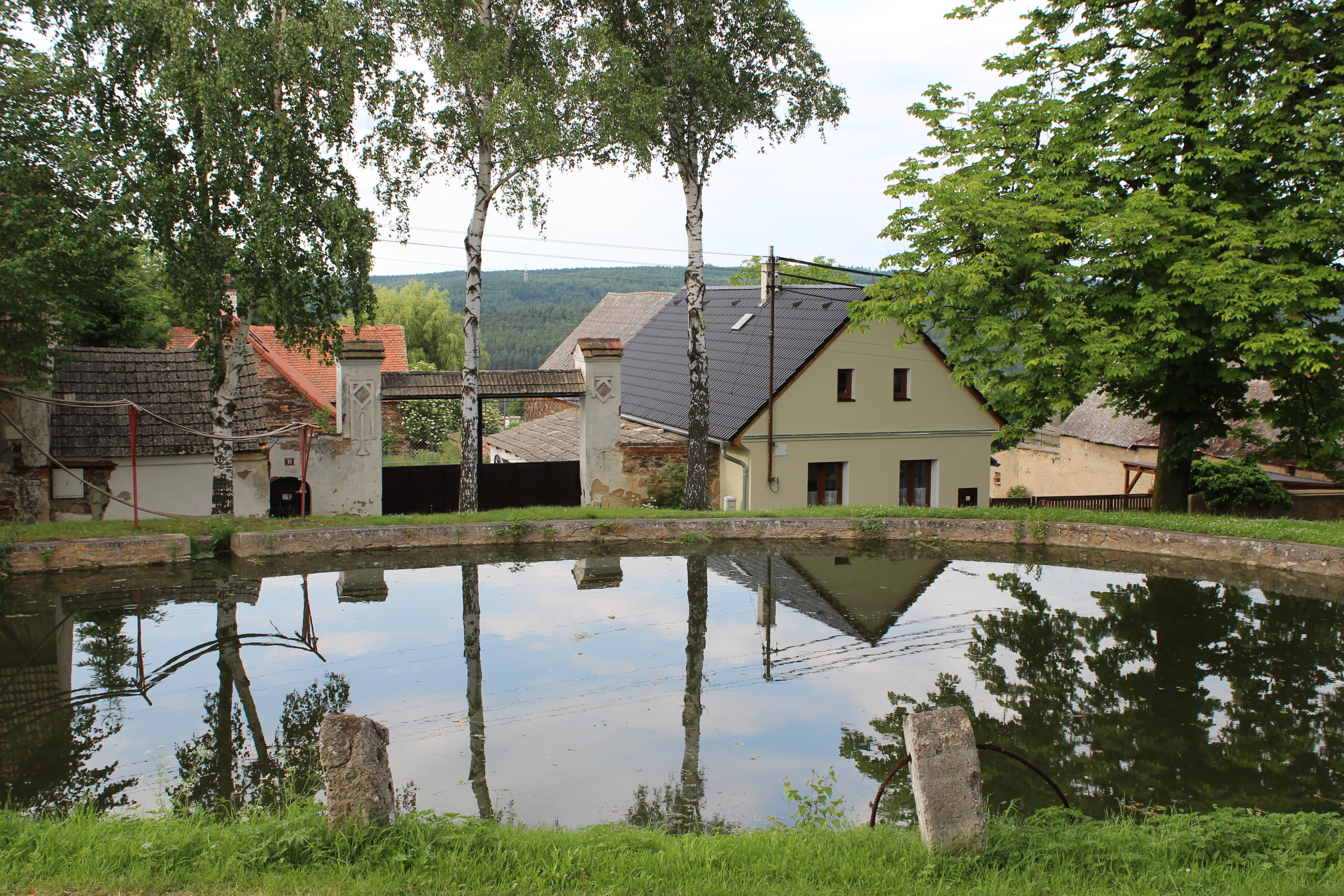 Nádrž a v pozadí zástavba v Chlumu, části Pavlíkova.